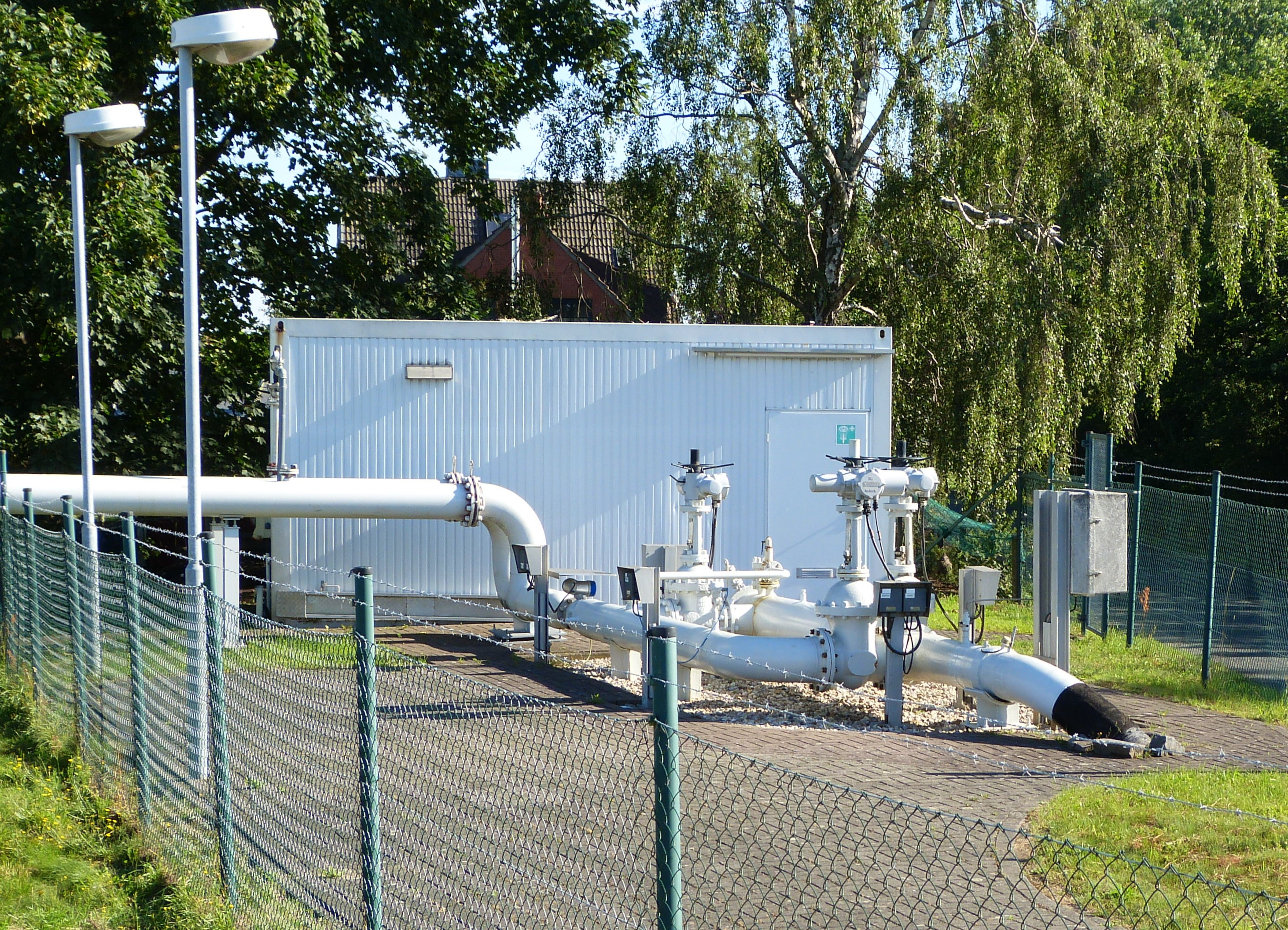 Kavernenfeld Lesum; Endpunkt der Solefernleitung im Werderland, Ventilgruppe und Molchstation, links Rohrleitungen zur Einleitung der Sole in die Weser, Blick vom Deich aus Südwest